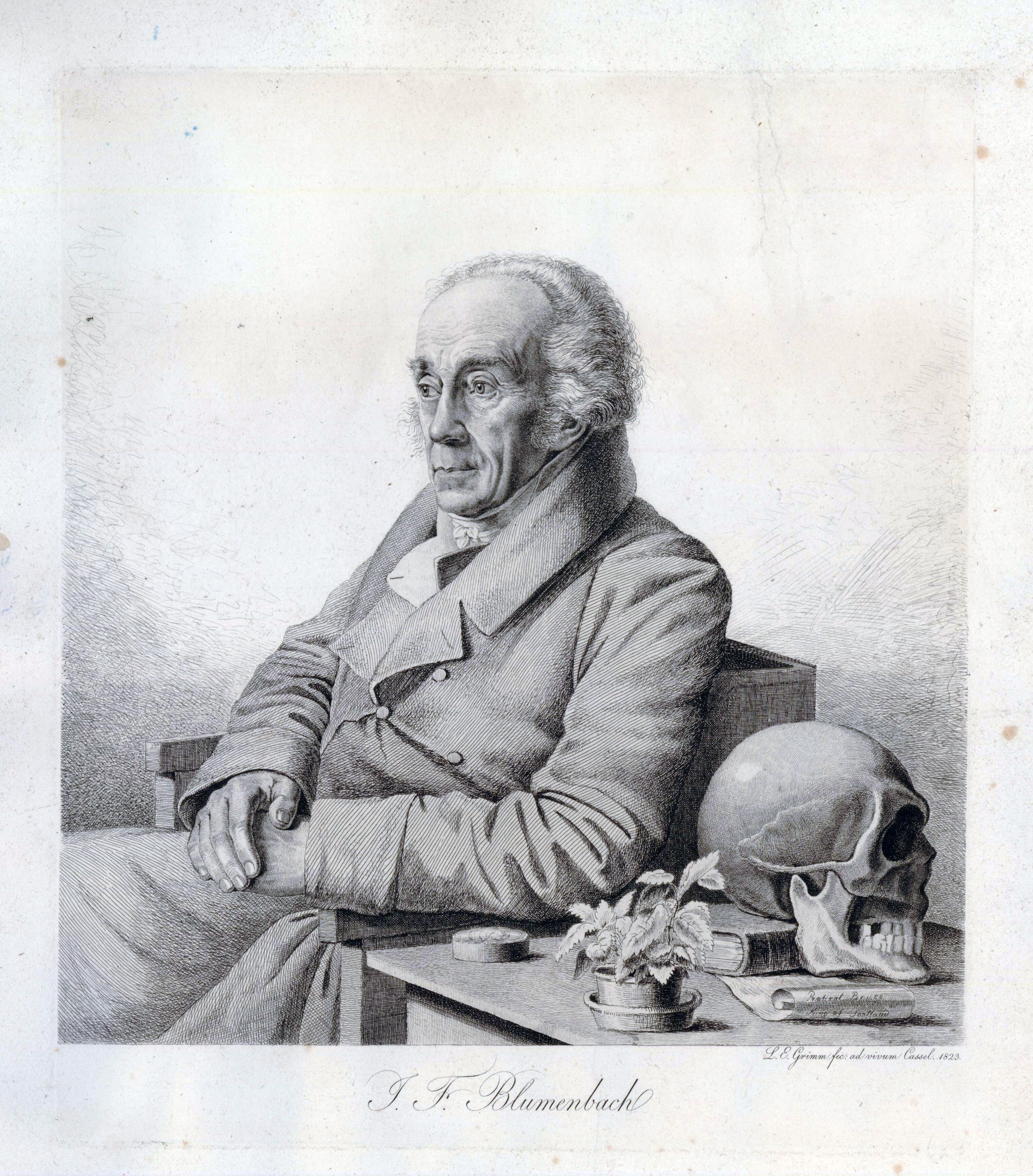 Johann Friedrich Blumenbach (1752–1840)